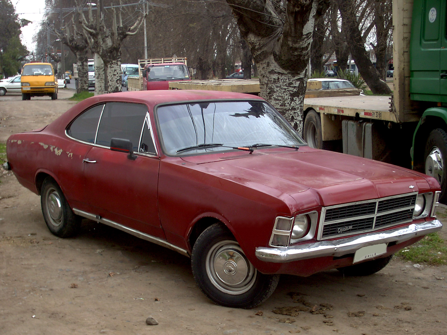 Brazilian Opel Rekord